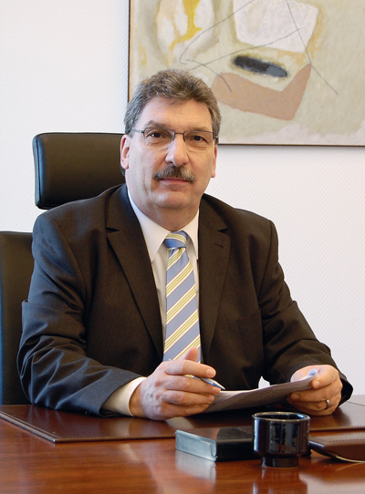 Ralf Wieland Präsident des Abgeordnetenhauses von Berlin in der 17. Wahlperiode